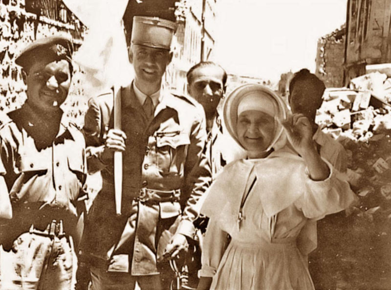 נזירה אוחזת בשיניים התותבות של חולה שנפלו מחלון בית החולים סן לואי שעל הקו העירוני אל שטח ההפקר